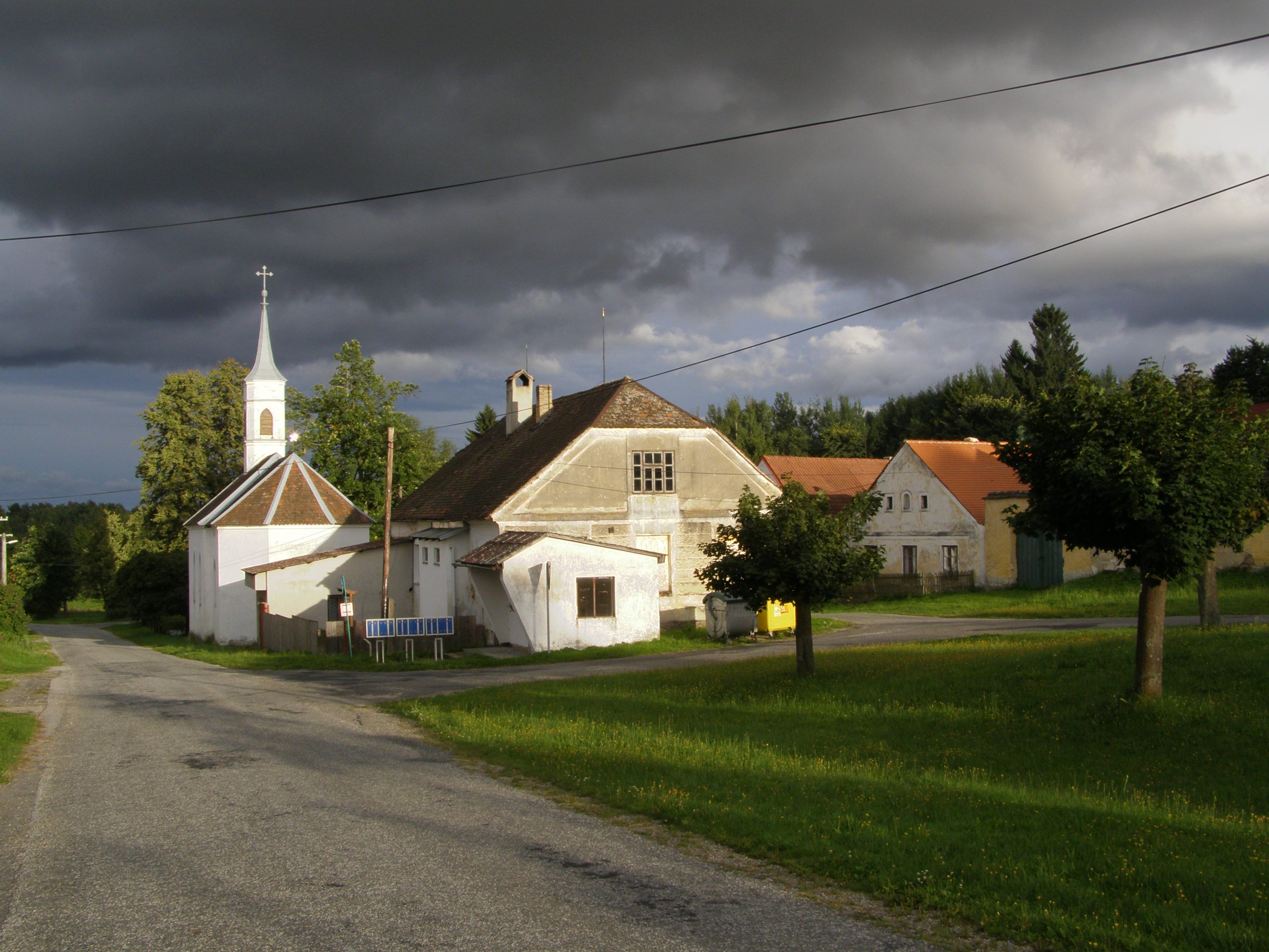 Česky: Slavonice, část Vlastkovec, náves, vlevo kaple Korunování Panny Marie